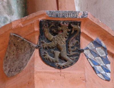 Kurpfälzisches Wappen in der Heidelberger Heiliggeistkirche um 1415 zur Zeit Ludwig III. V.l.n.r.: Reichsvikariat, Pfalz, Bayern